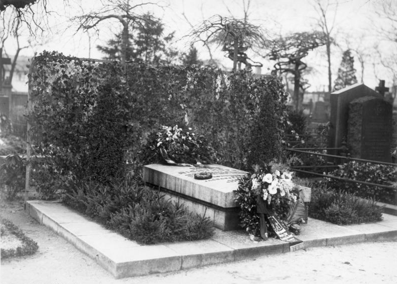 Scherl: Das geschmückte Grab des Fliegers Freiherr v. Richthofen auf dem Invalidenfriedhof in der Scharnhorststr. 7097-31